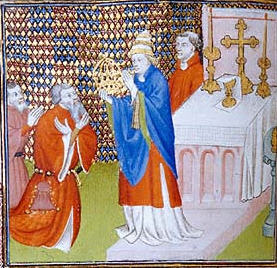 Ppaež korunuje karla Velikého